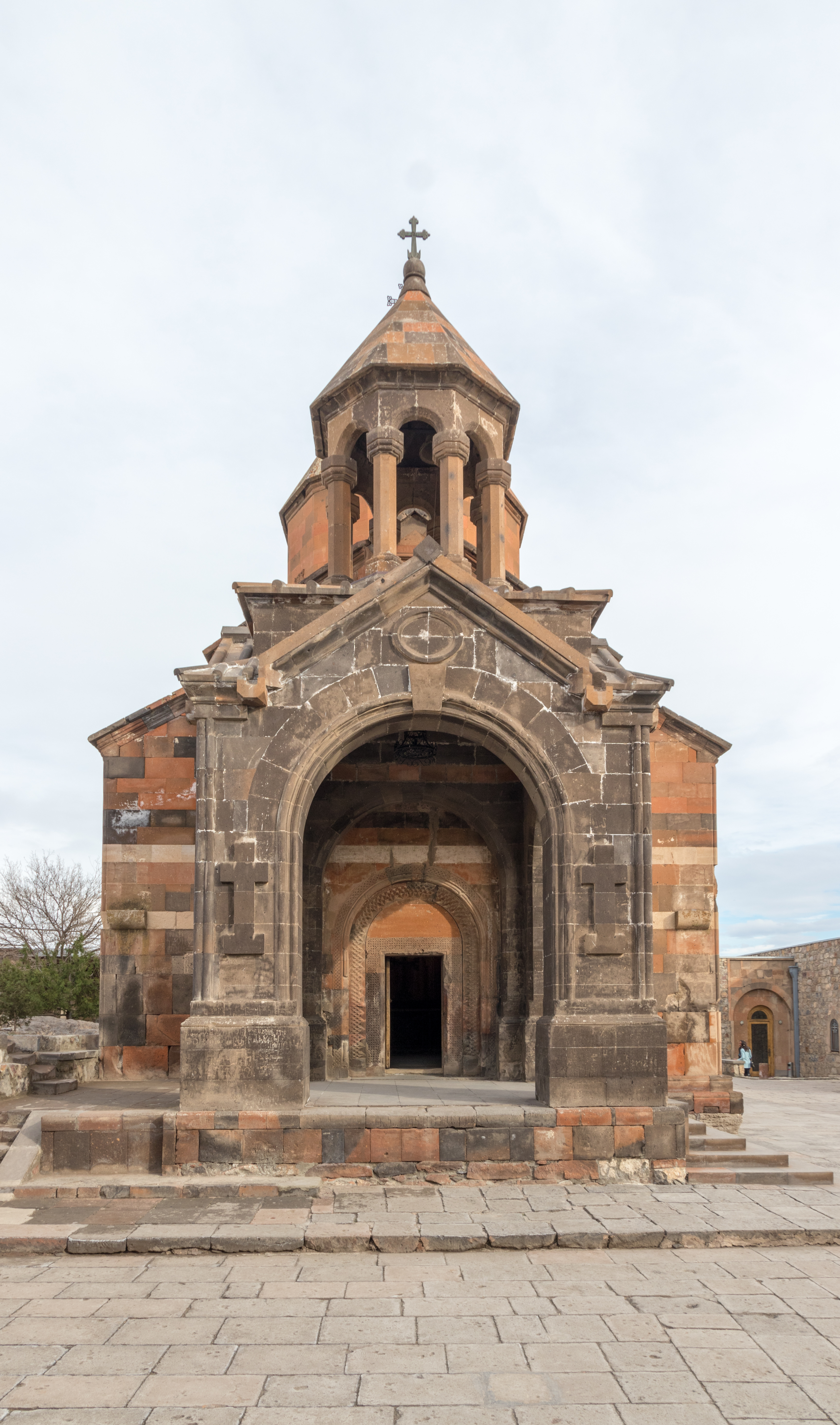 Khor Virap